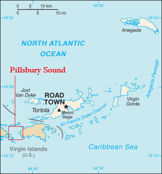 Localització del Pillsbury Sound, màniga d'aigua que separa les illes de Saint Thomas i Saint Jhon (Illes Verges, EUA)